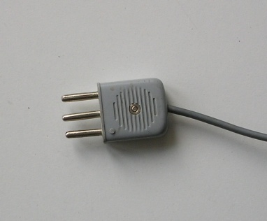 Lautsprecherstecker, eine ältere Norm auch für den ELA-Bereich